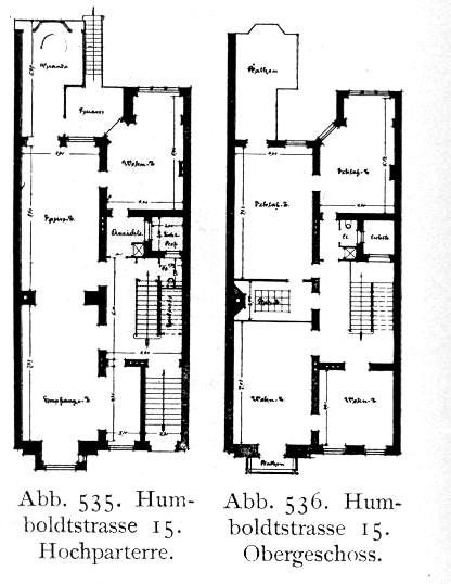 Wohnhaus Humboldtstraße 15 in Düsseldorf, erbaut vor 1904, Architekten Kayser, v. Großheim und Wöhler, Grundrisse.JPG